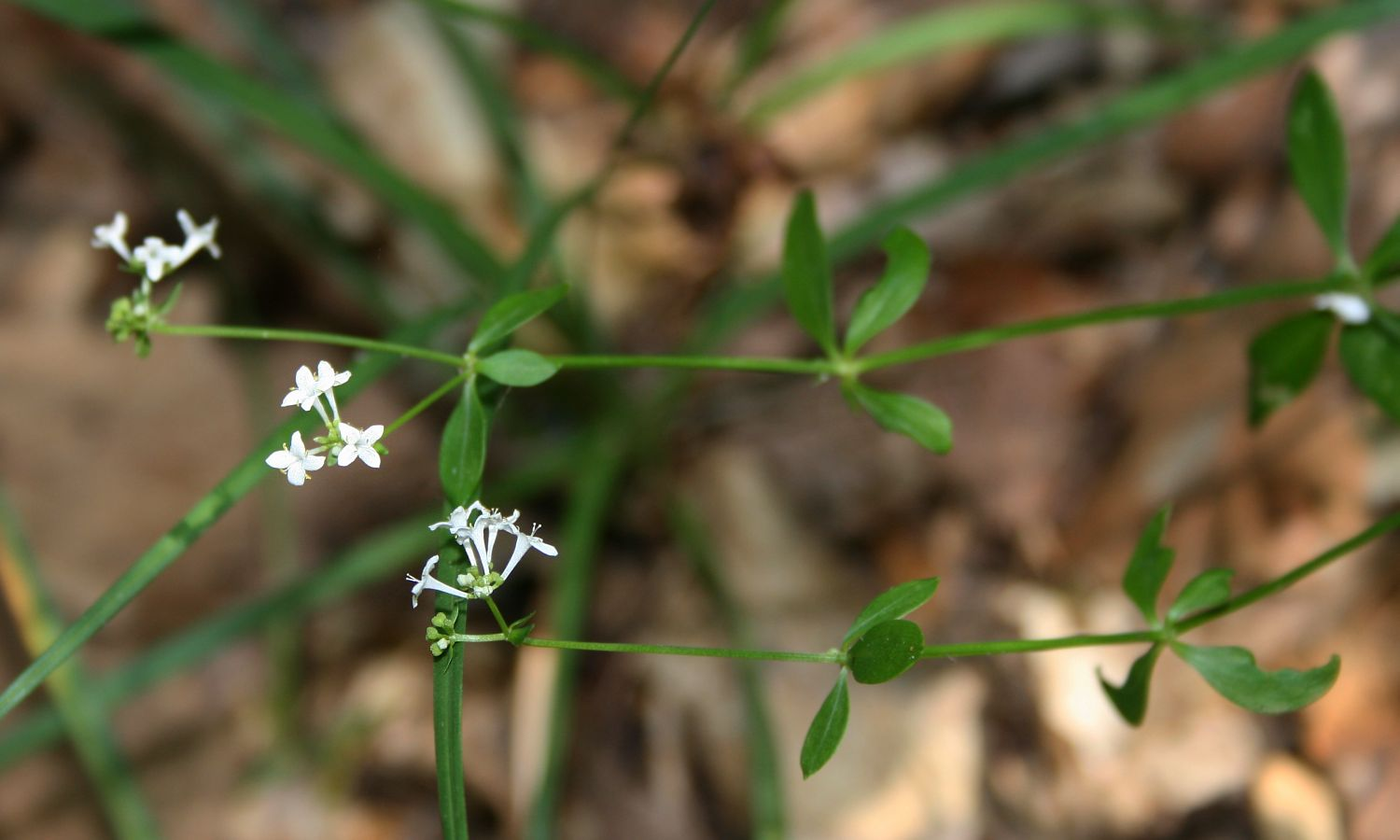 Asperula involucrata, Kaffeegewächse (Rubiaceae) - Türkei/Türkiye/Turkey: Düzce Prov./Düzce ili, NW Kalkın W Akçakoca, Eichen-Mischwald